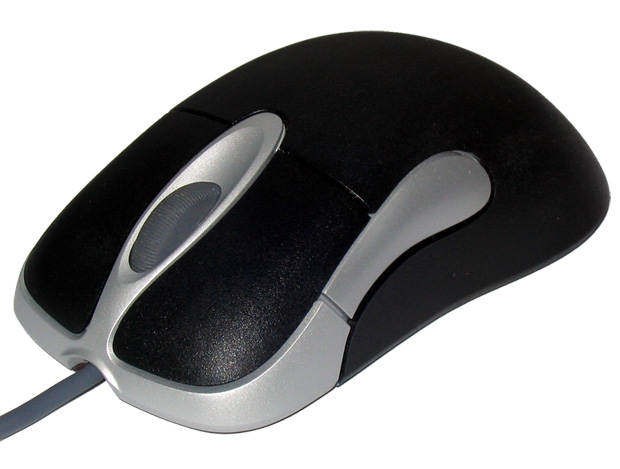 Beschreibung: 5 Tastenmaus von Microsoft IntelliMouse Optical Black Fotograf: Darkone, 18. Oktober 2004